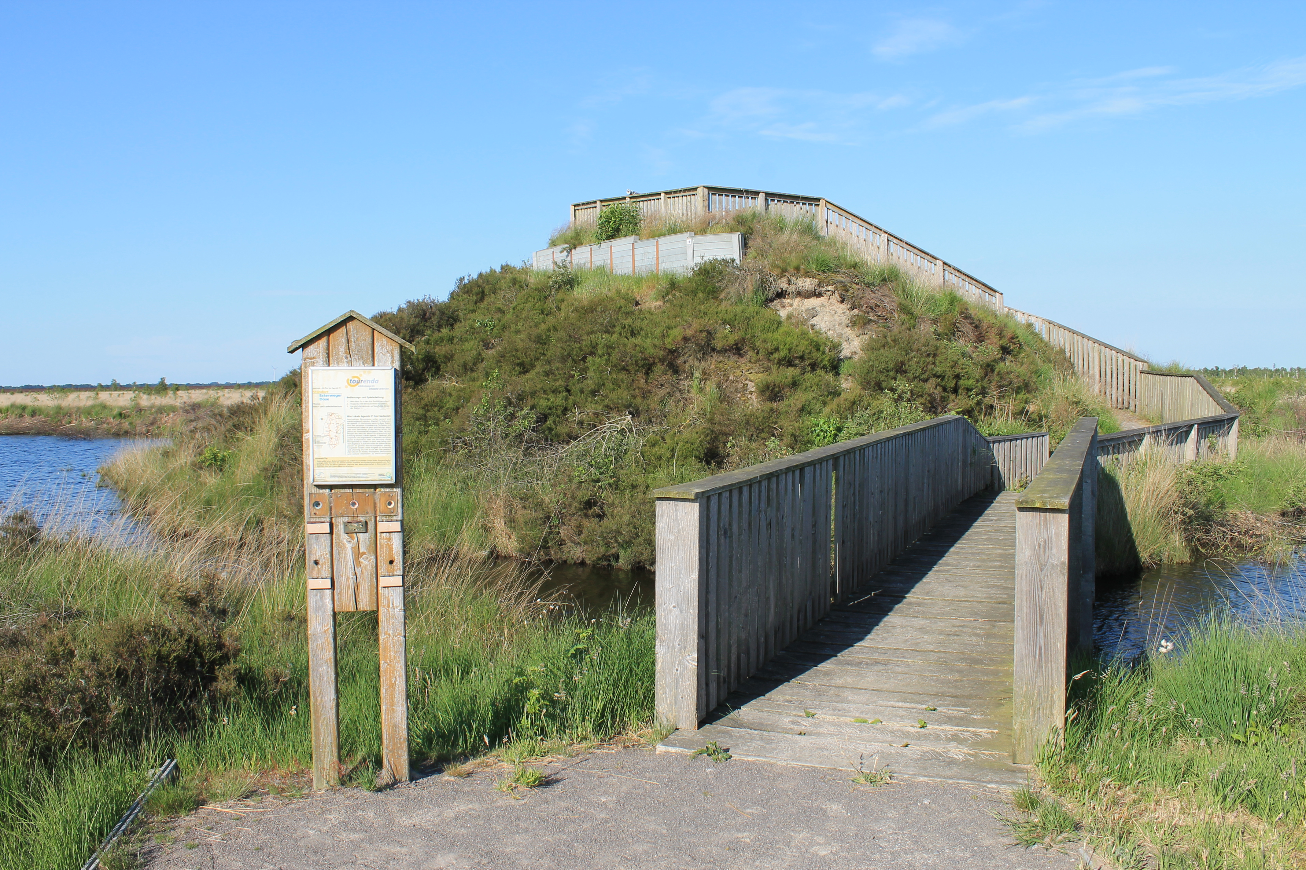 Moorgebiet mit Aussichtsturm, Naturschutzgebiet „Esterweger Dose“